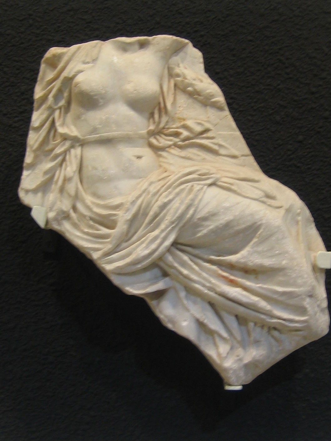 Rea Silvia procedente del teatro romano de Cartagena. Museo Arquelógico de Cartagena.